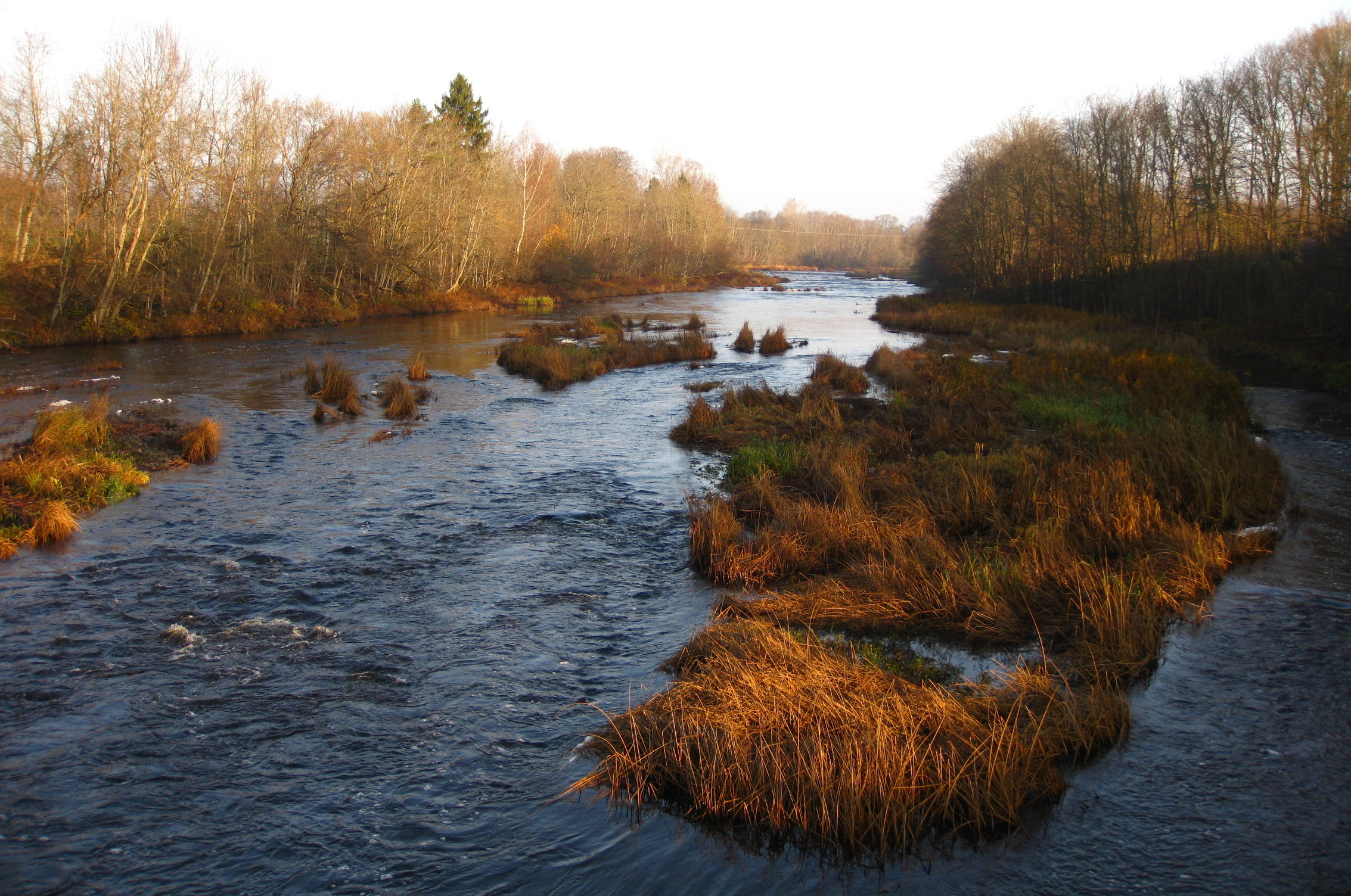 Pärnu jõgi Tori Jõesuus